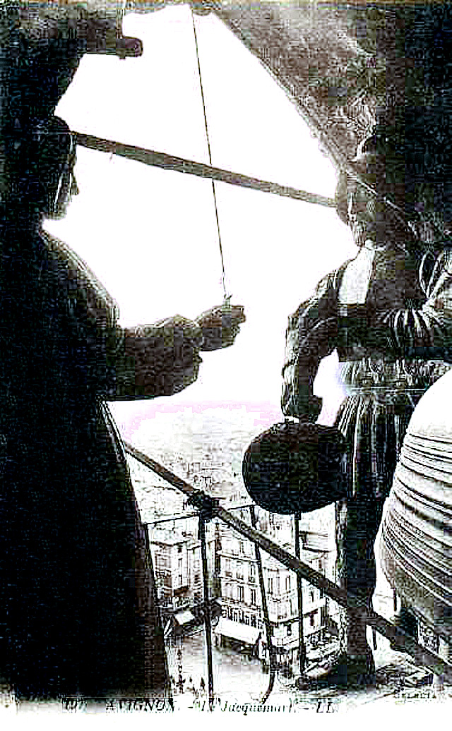 Le Jacquemart de la tour de l'Hôtel de ville d'Avignon